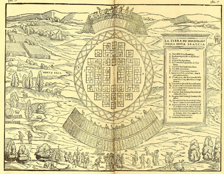 Hochelaga village - circa 1535 - From Ramusio. Plan d’Hochelaga au XVIe siècle, à l’emplacement actuel de Montréal, province de Québec, Canada. Ce plan dessiné par Giacomo Gastaldi, se trouve dans le livre en italien de Giovanni Battista Ramusio, Delle Navigationi et Viaggi, (Venise, 1565). Réimpression 1609